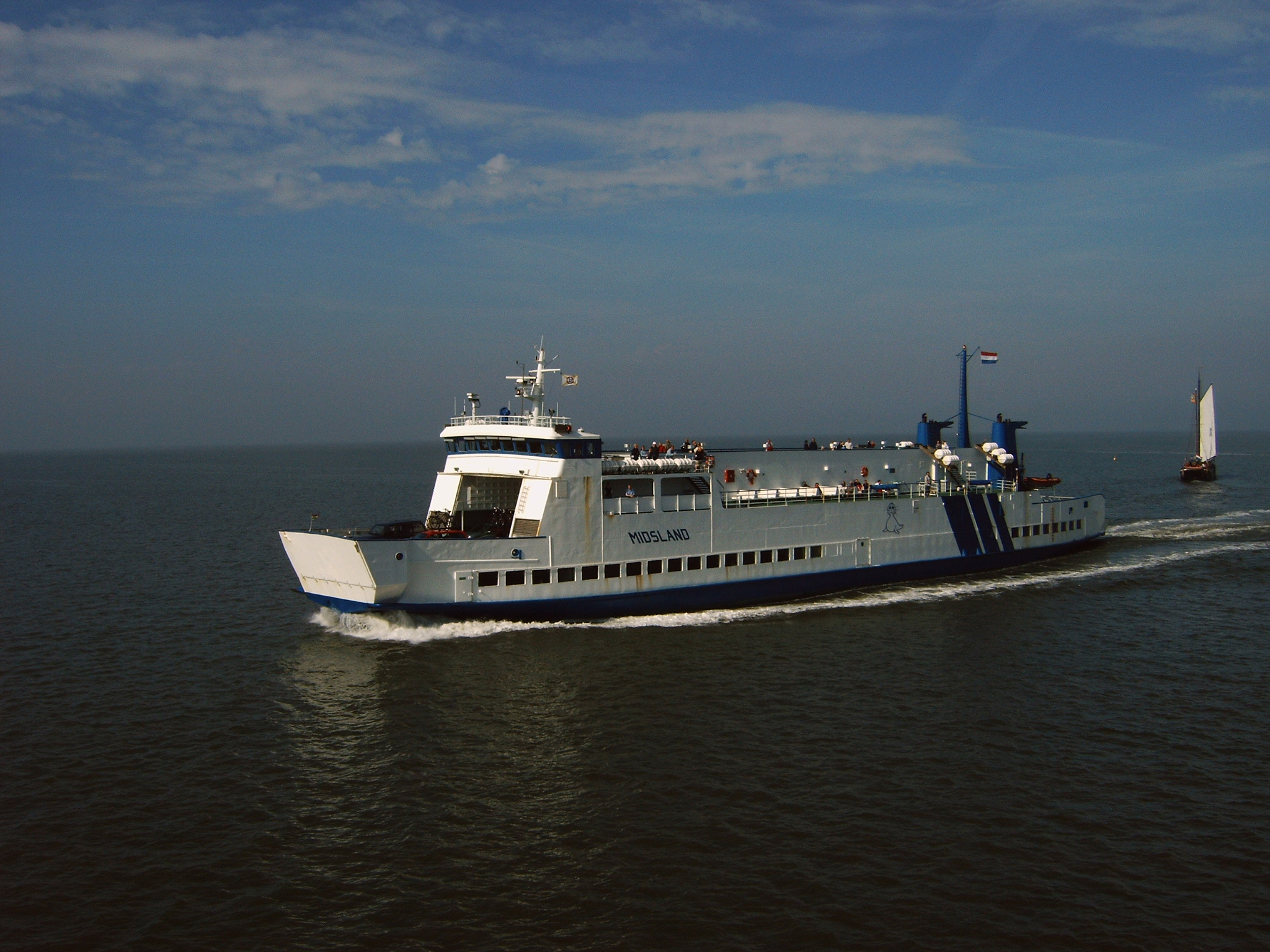 Dit is de Midsland op de Waddenzee IMO number: 7393066